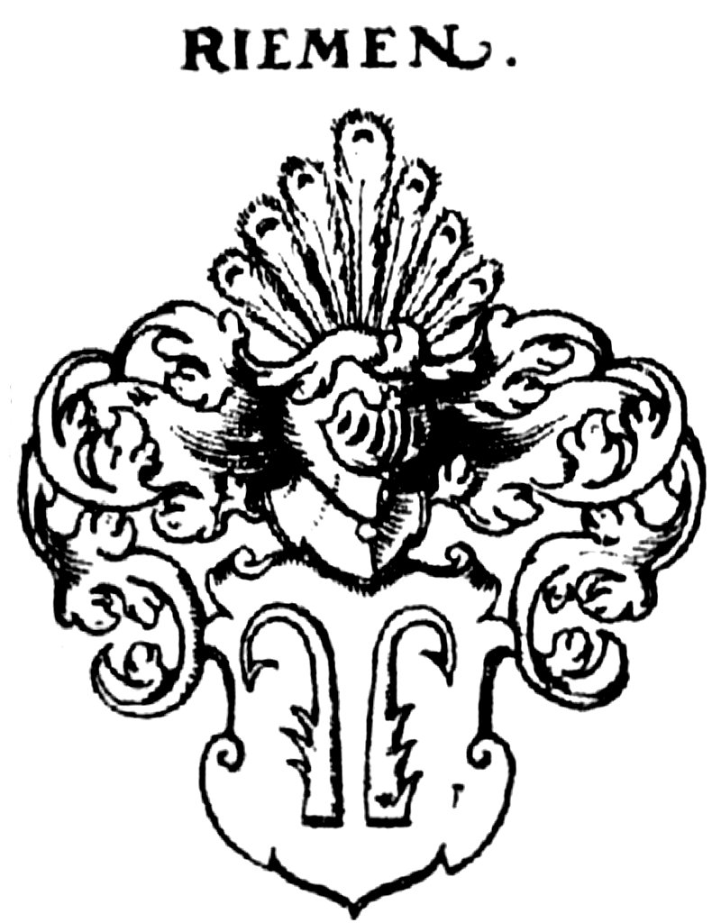 Johann Siebmacher Wappenbuch (B1249): Wappen derer von Riemen